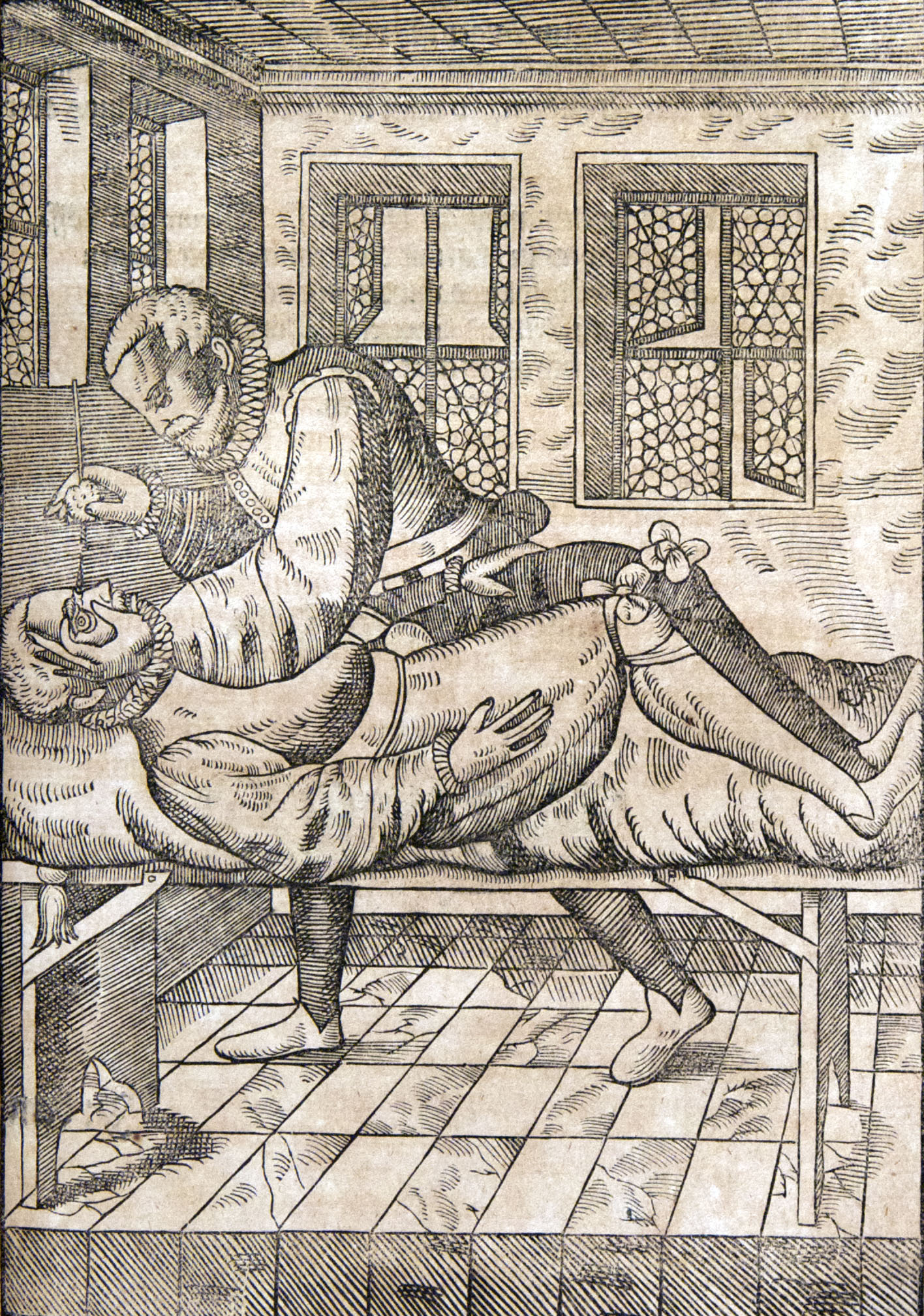 Ophthalmodouleia, p. 146r